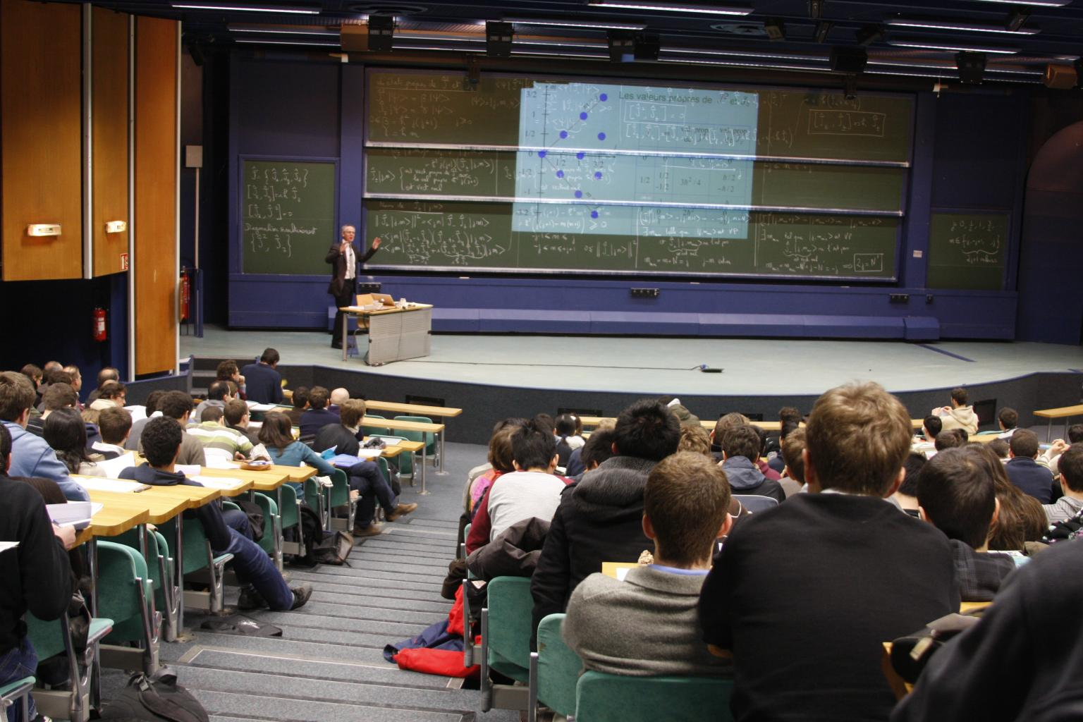 Campus de l'École polytechnique, amphi magistral.